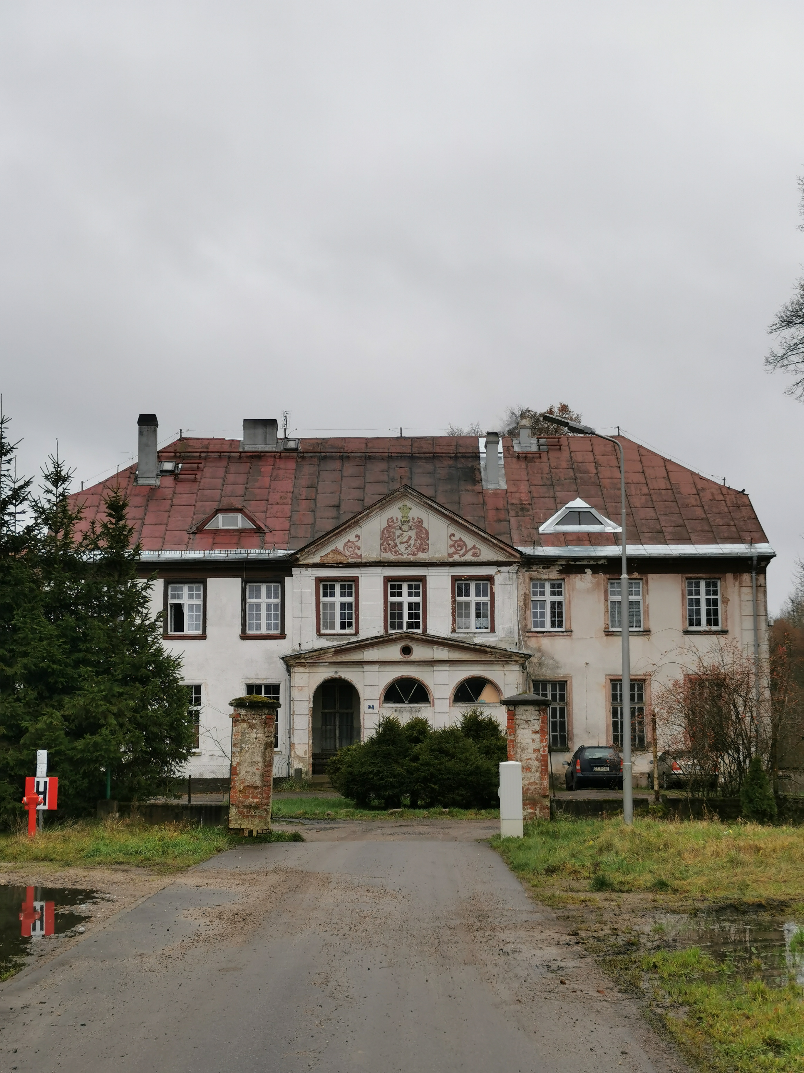 Pałac w Starnicach